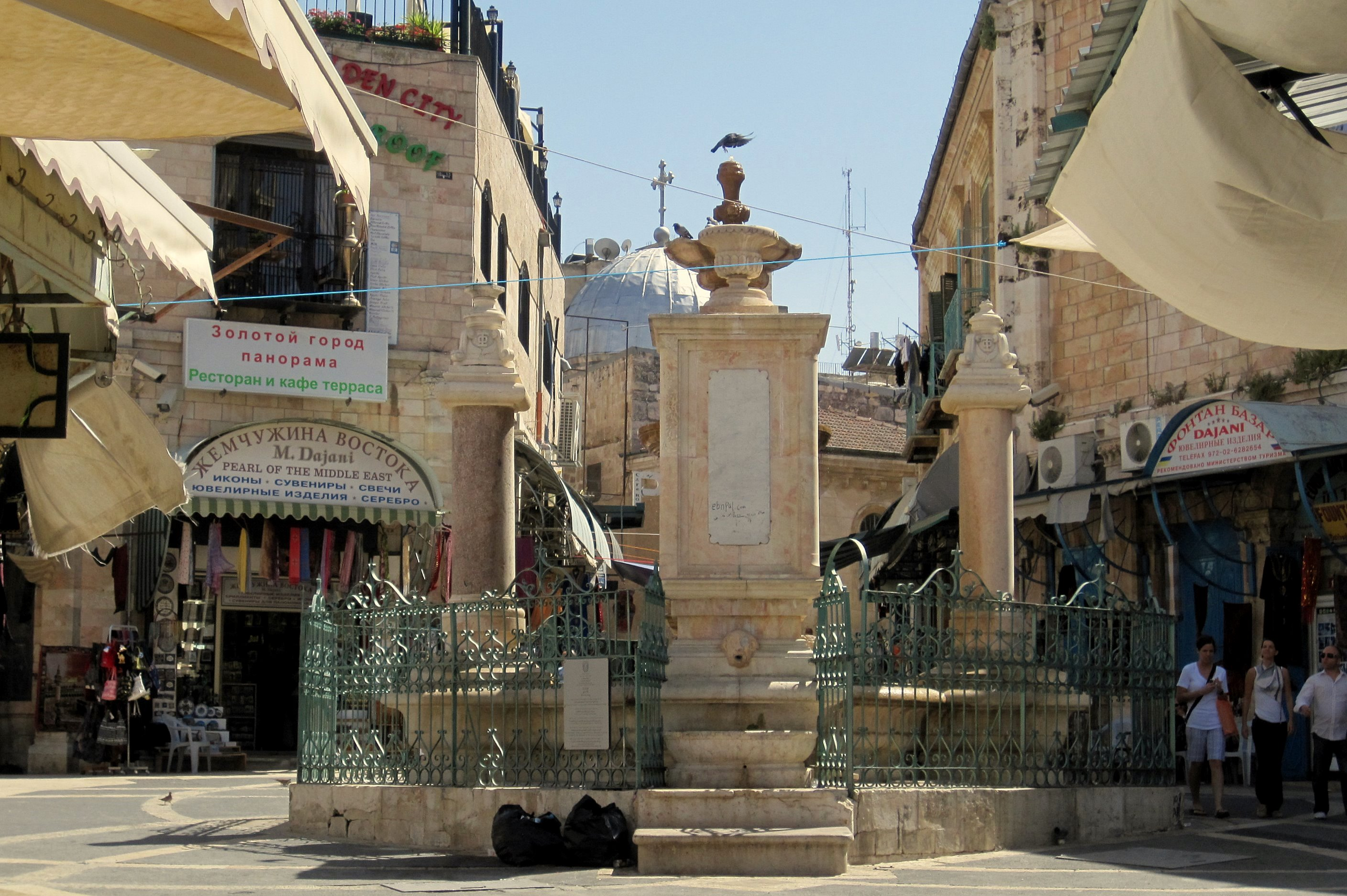 המוריסטן הוא השוק המרכזי של הרובע הנוצרי בעיר העתיקה בירושלים. הוא מורכב מרחובות, כיכרות, חנויות ובתי מלאכה הסובבים כיכר מרכזית ובה מזרקה גדולה.